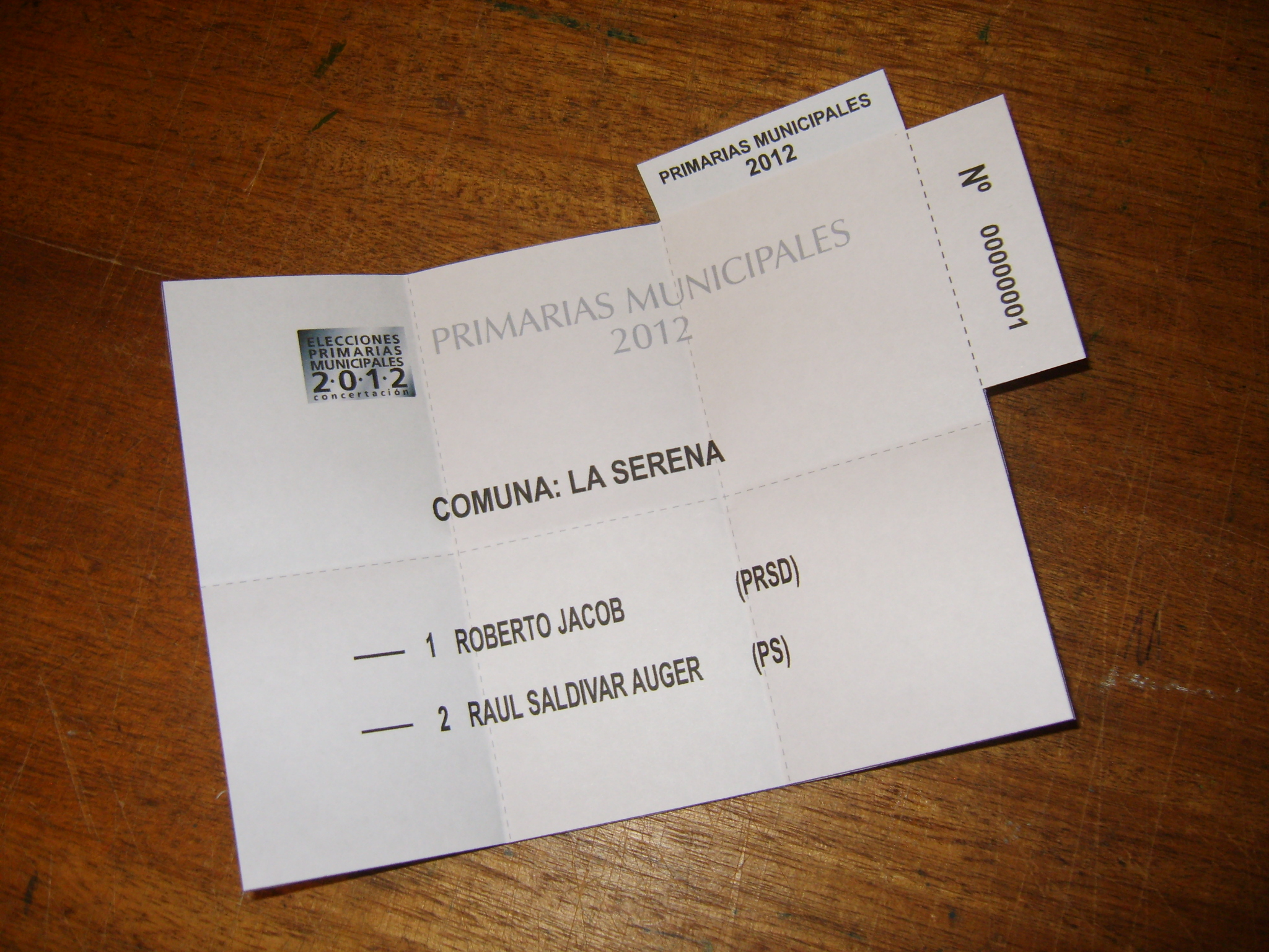 Voto de la elección primaria de la Concertación para definir al candidato a alcalde en La Serena.